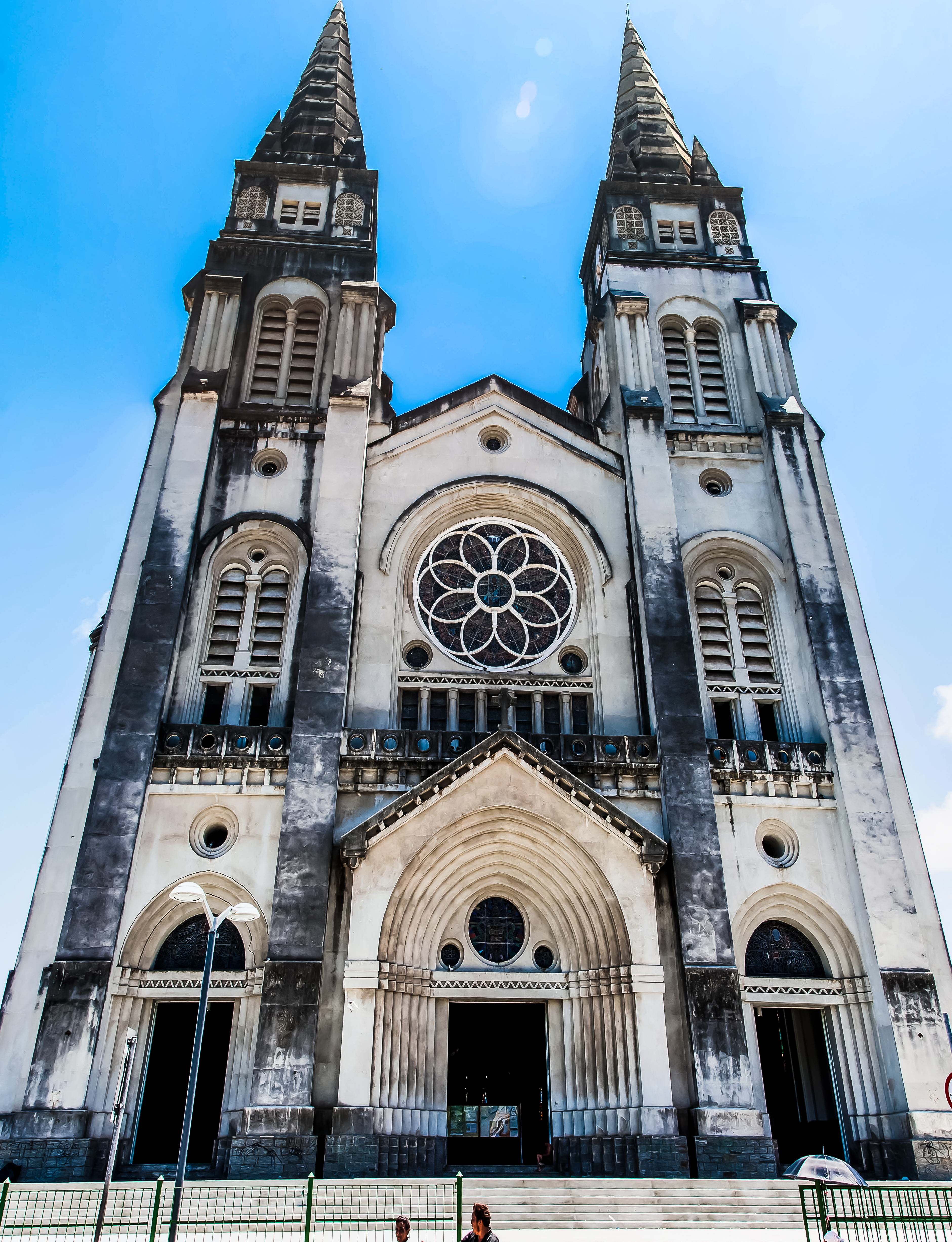 Igreja Matriz - Fortaleza/CE